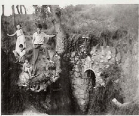 Font de la Mina de Can Berrenguer a Parets del Vallès.